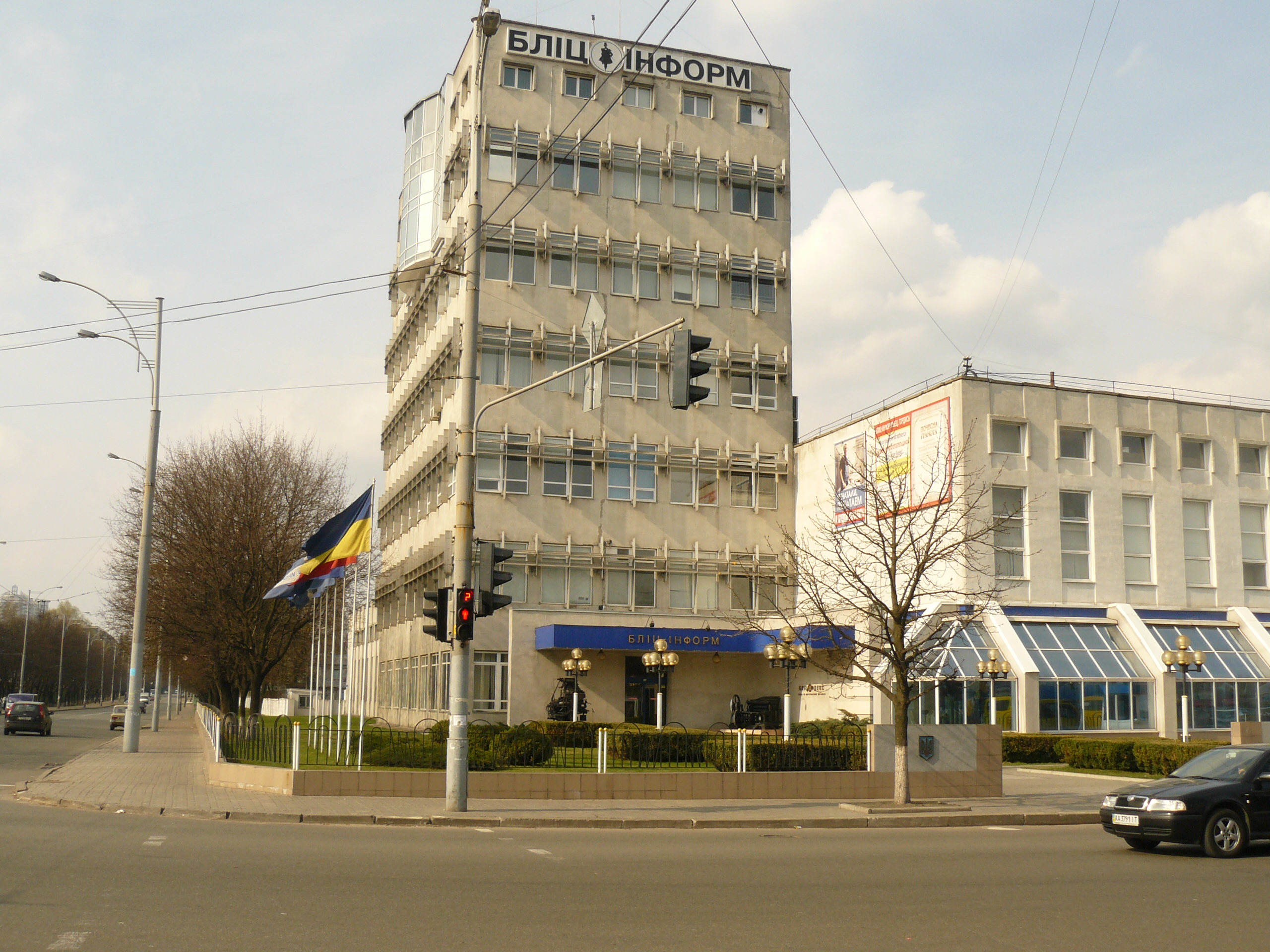 ЗАТ «Холдингова компанія «Бліц-Інформ» (вул. Кіото, 25)